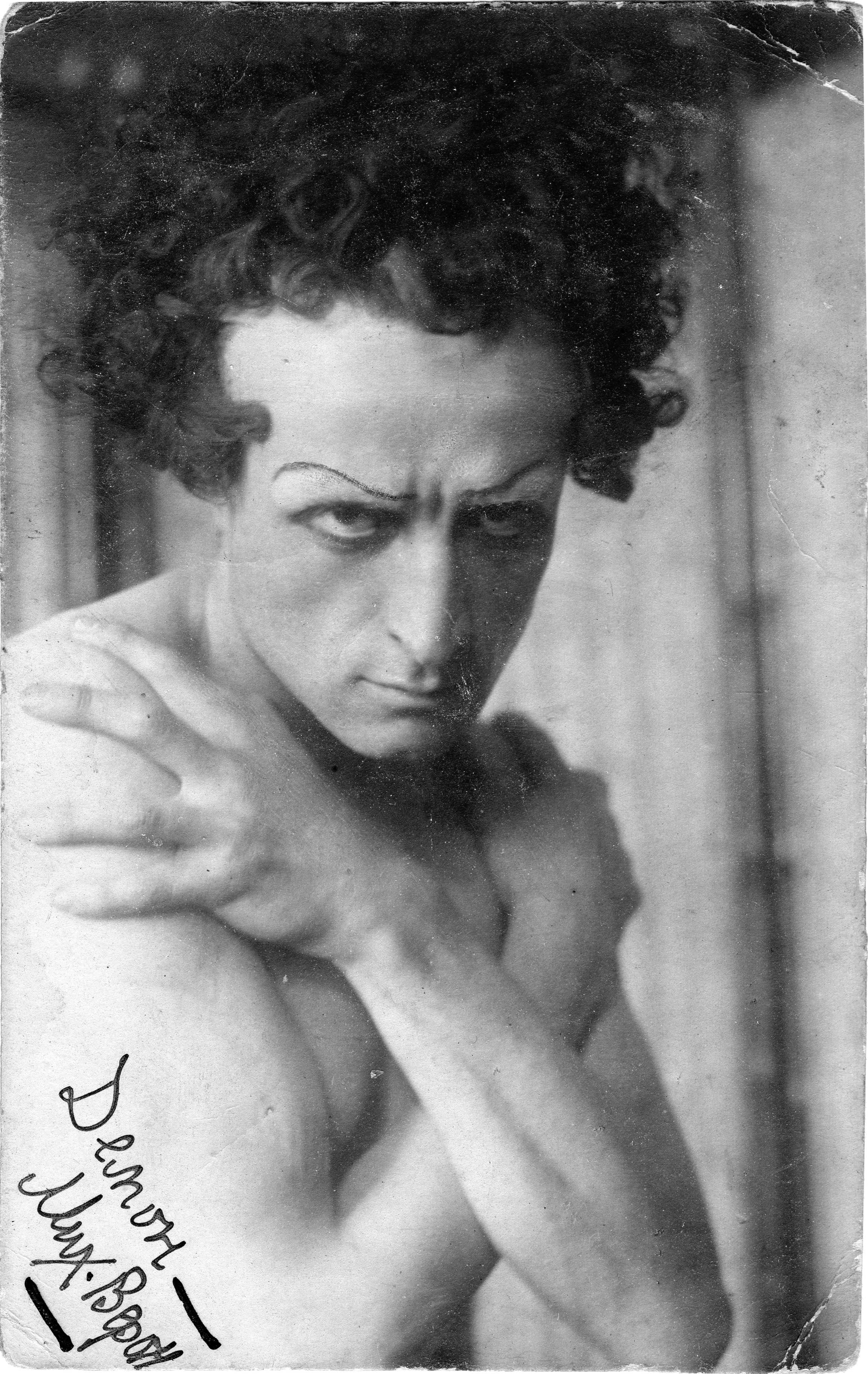 Михаил Петрович Волконский в роли Демона в одноименной опере А. Г. Рубинштейна